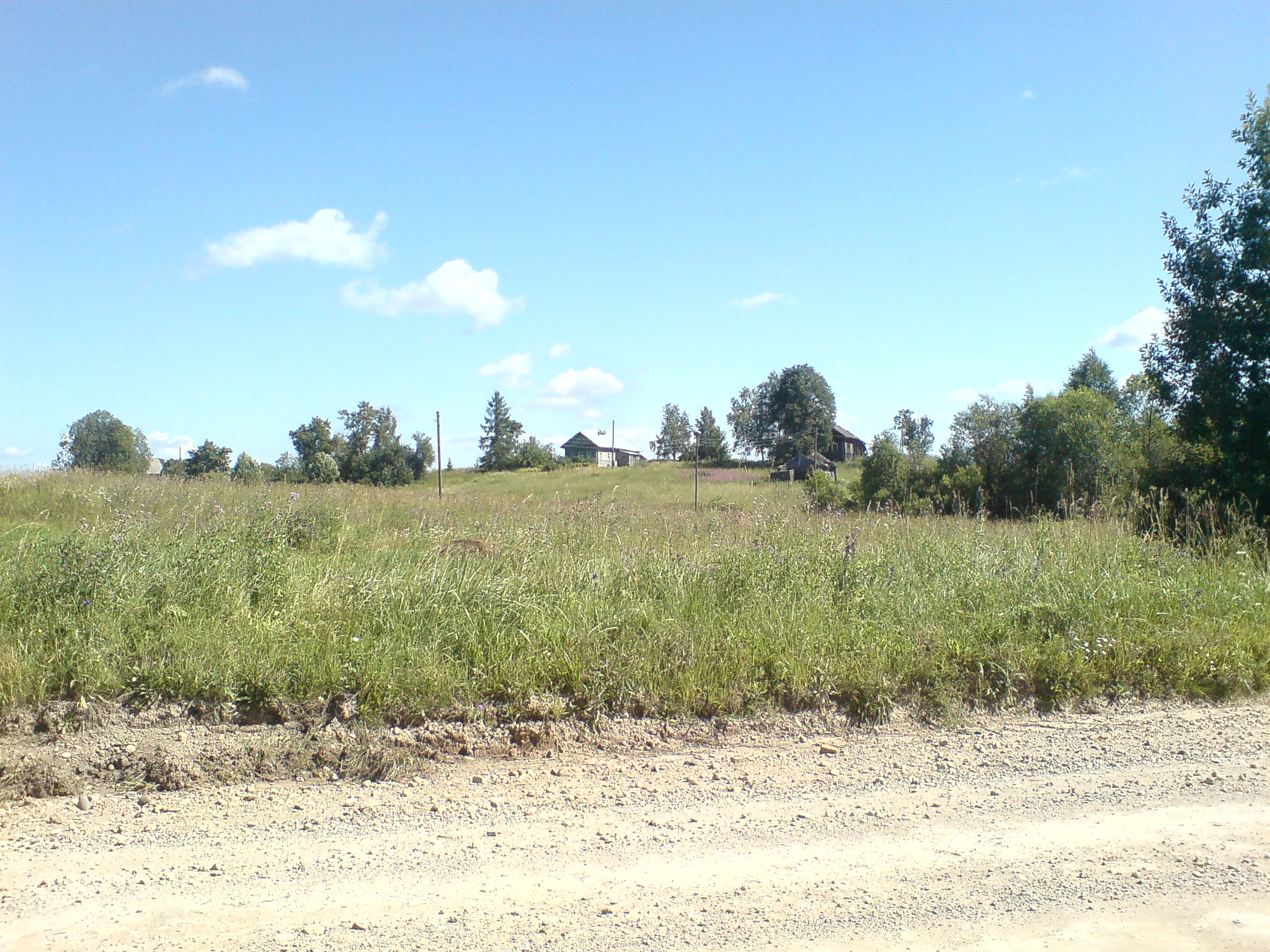 Большое Дивково в Кирилловском районе